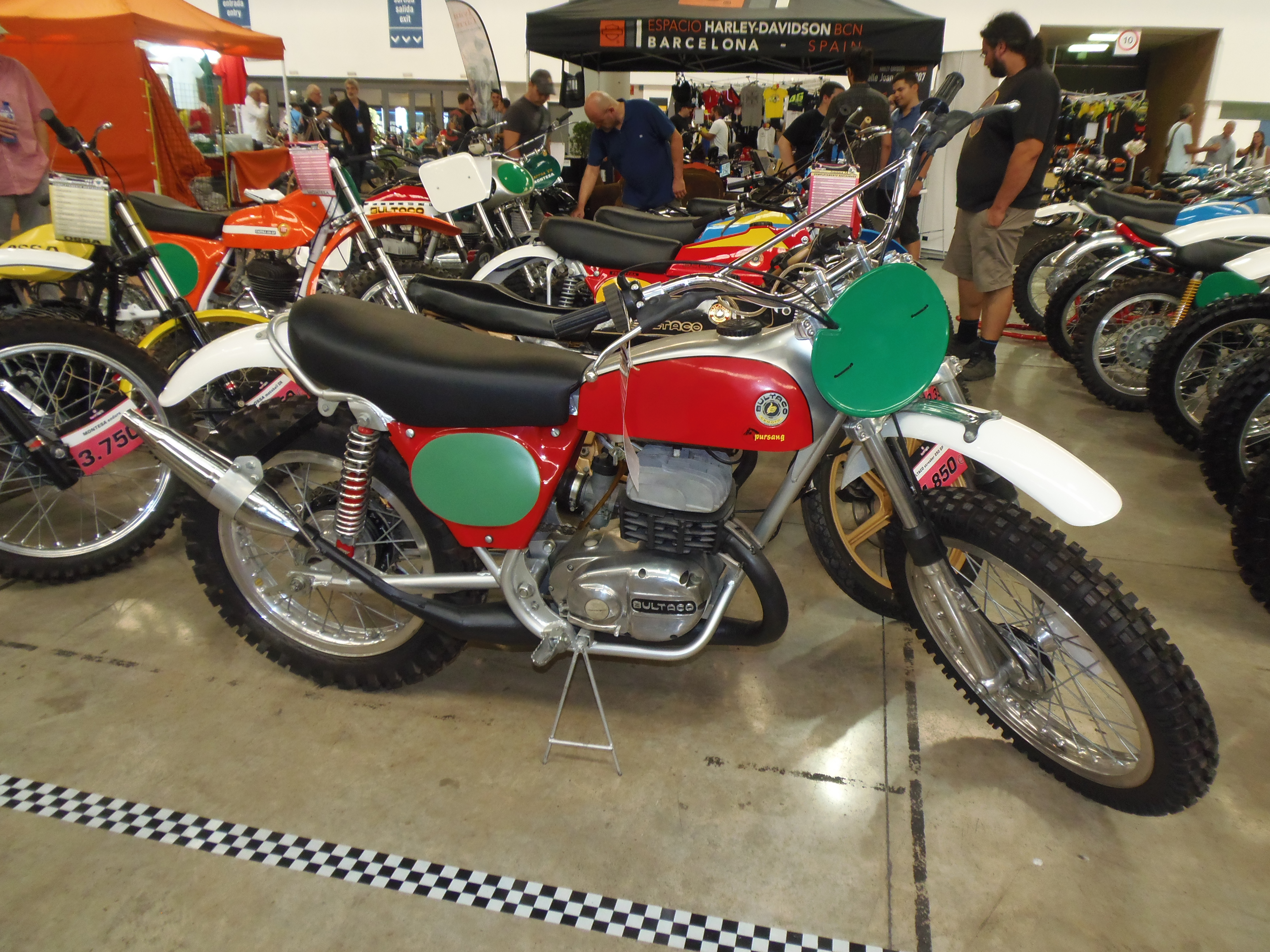 Bultaco Pursang 250 Mk6, 1972